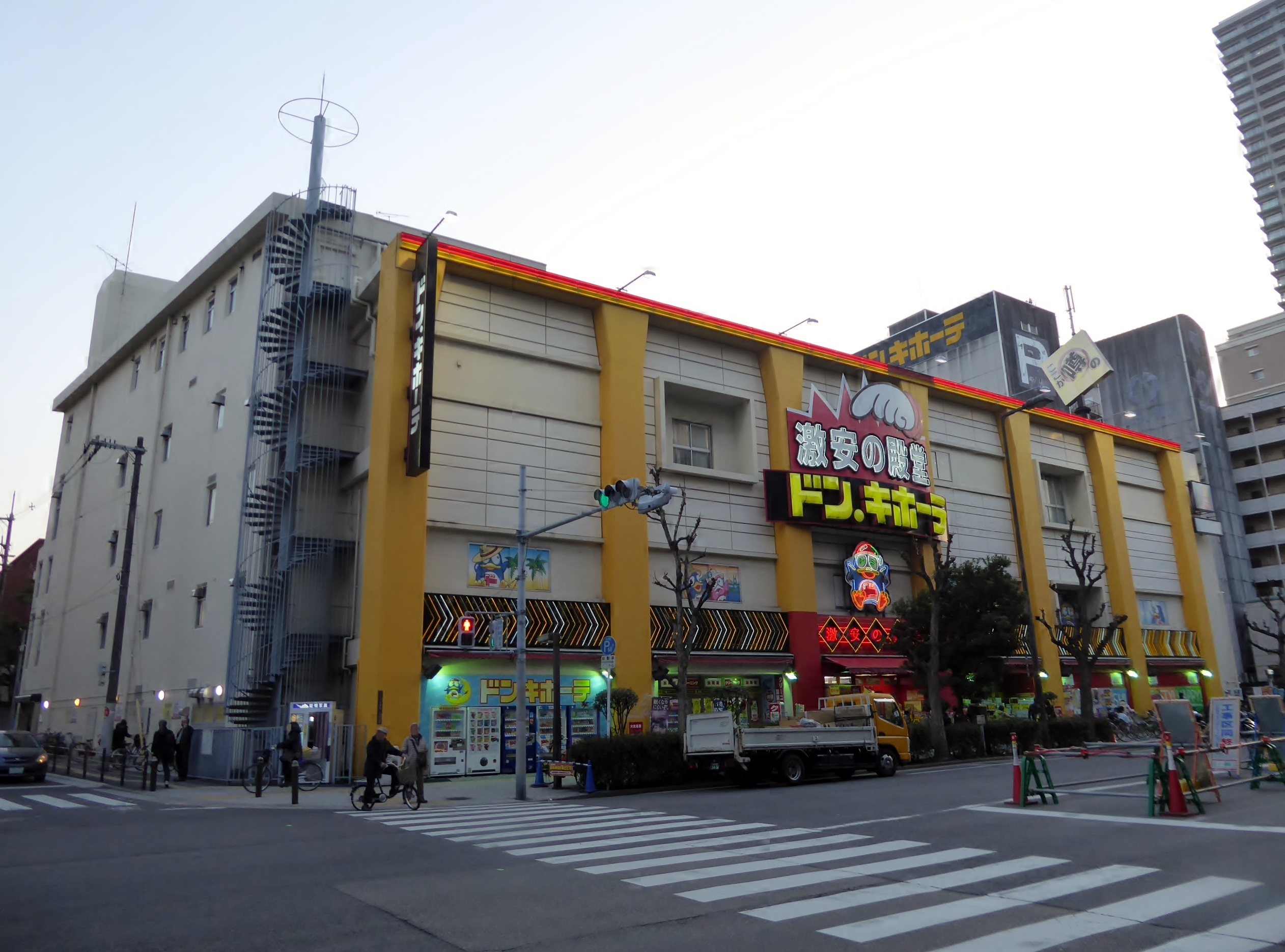 ドン・キホーテ上本町店を撮影。